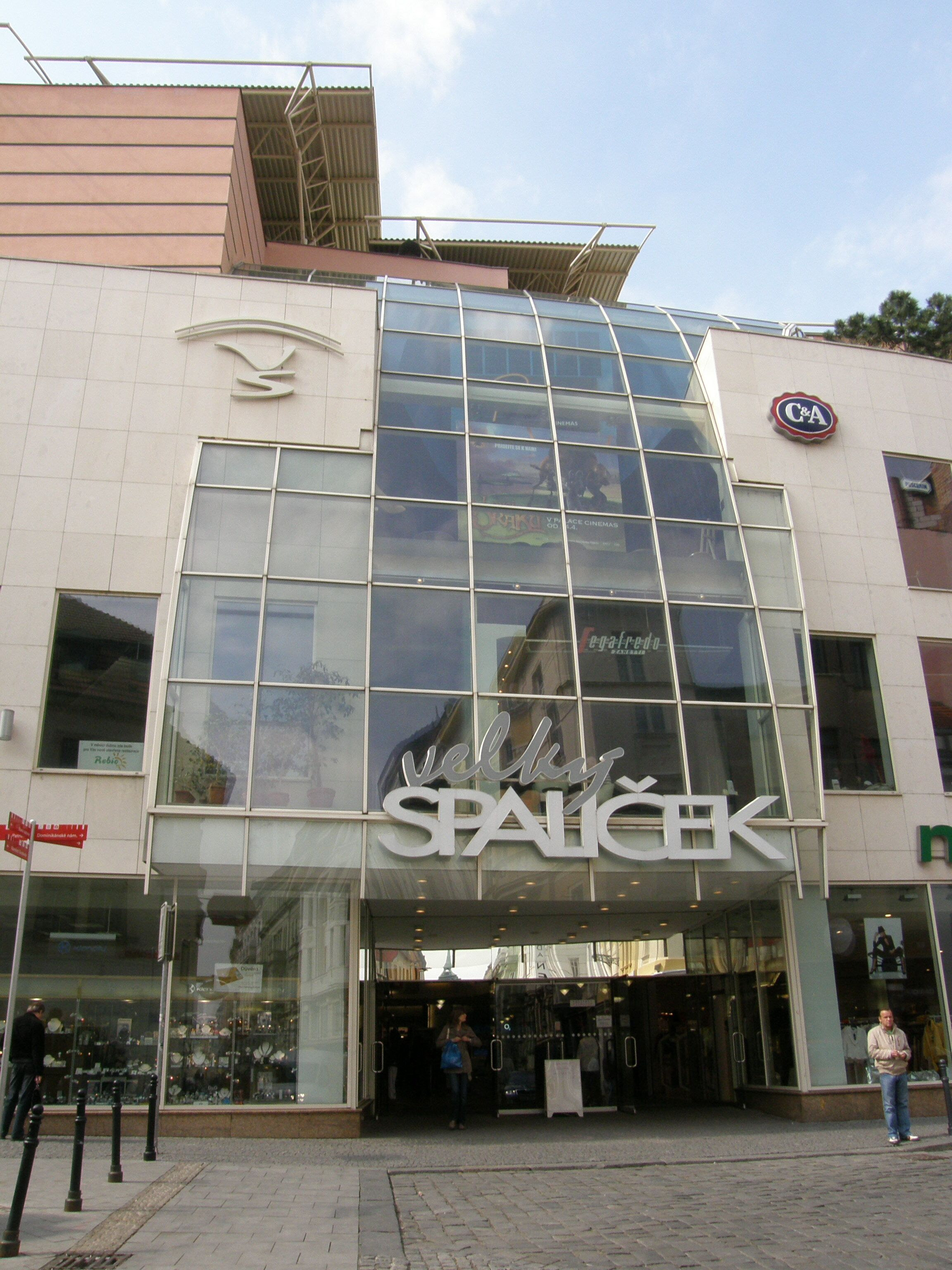 Velky Spalicek (Brno)